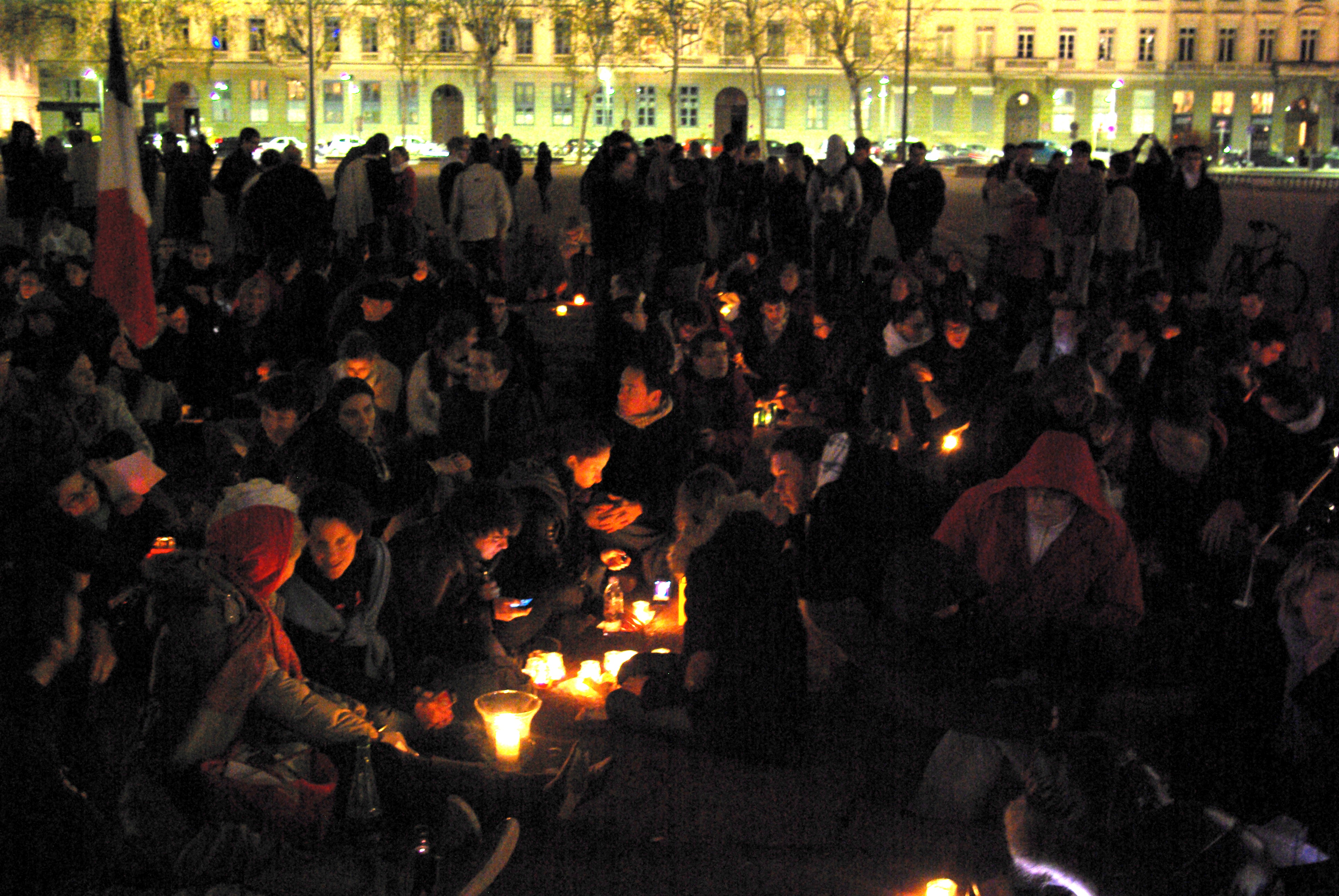 Les Veilleurs sur la place Bellecour, à Lyon le 19 avril 2013